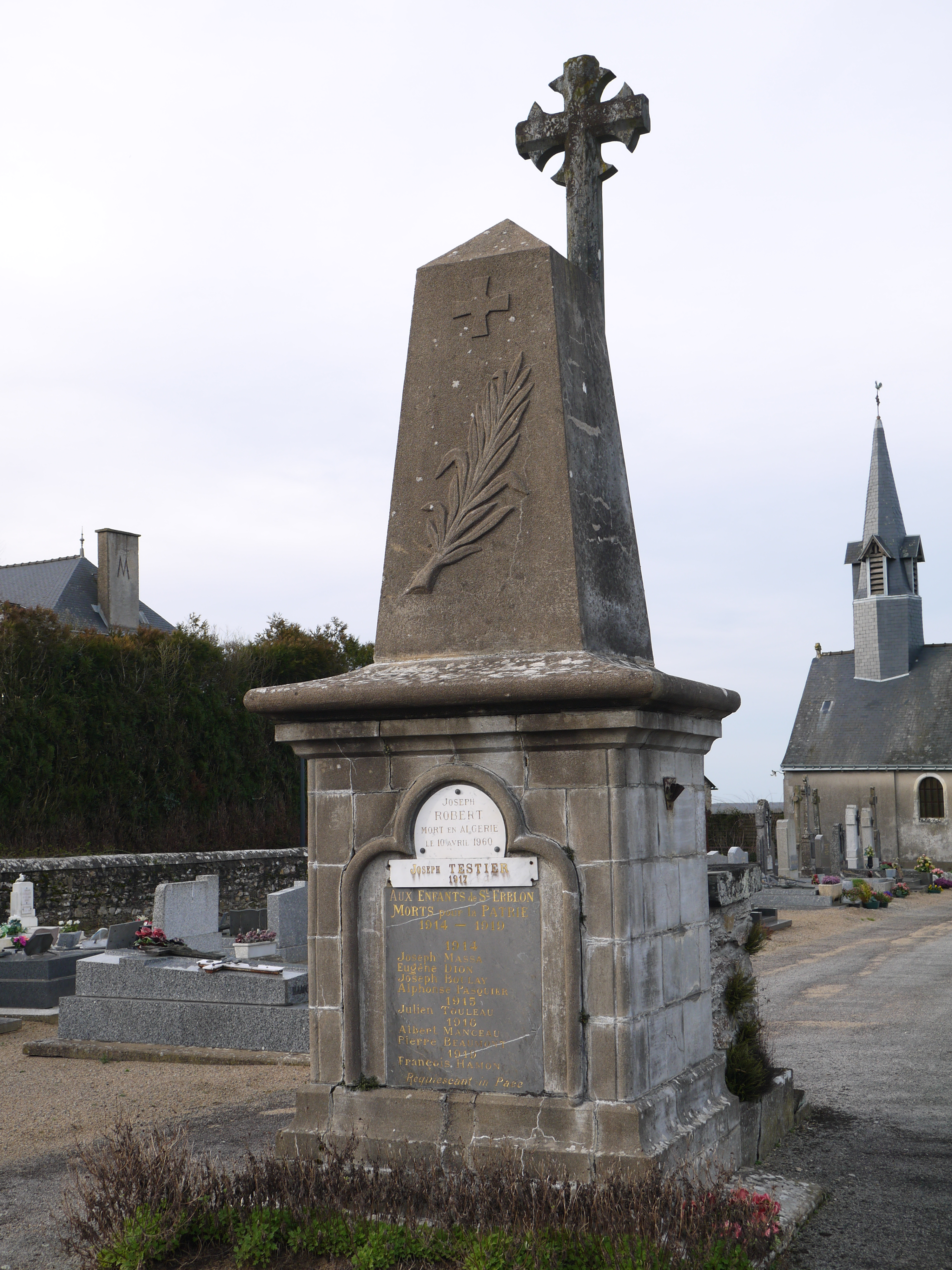 Autre vue du monument aux morts